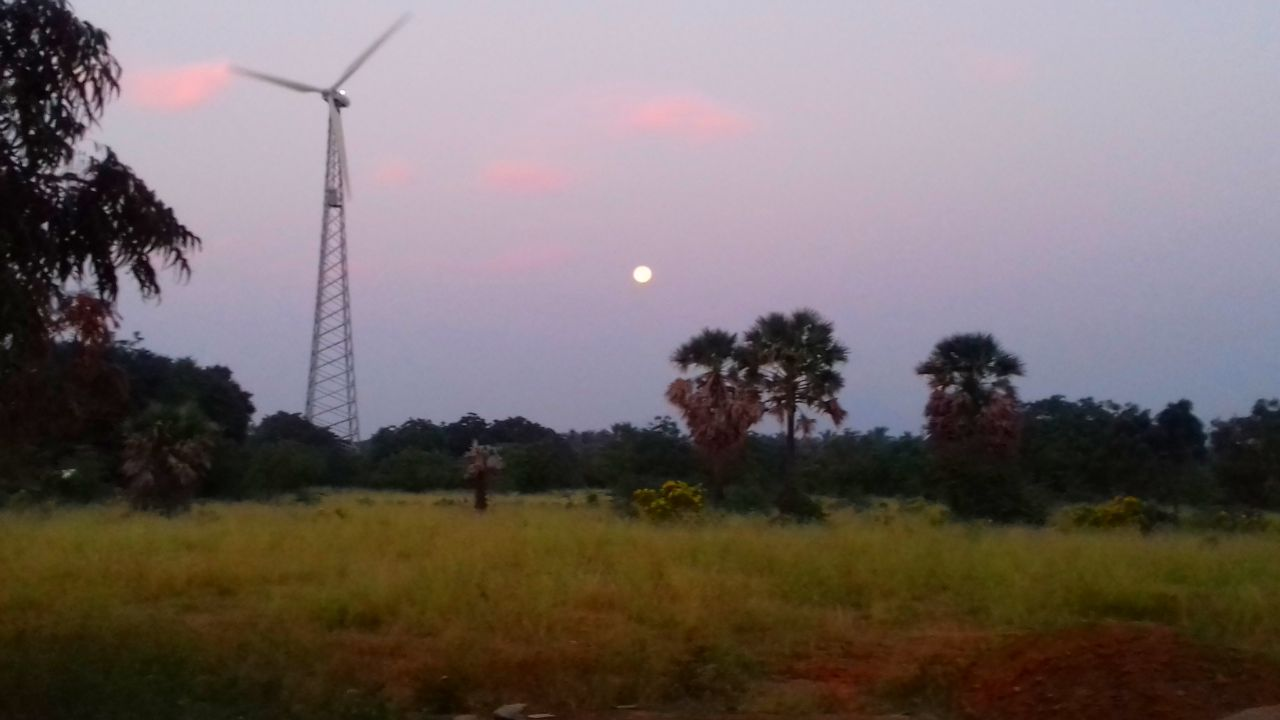 A blue moon eclipse from thendral nagar